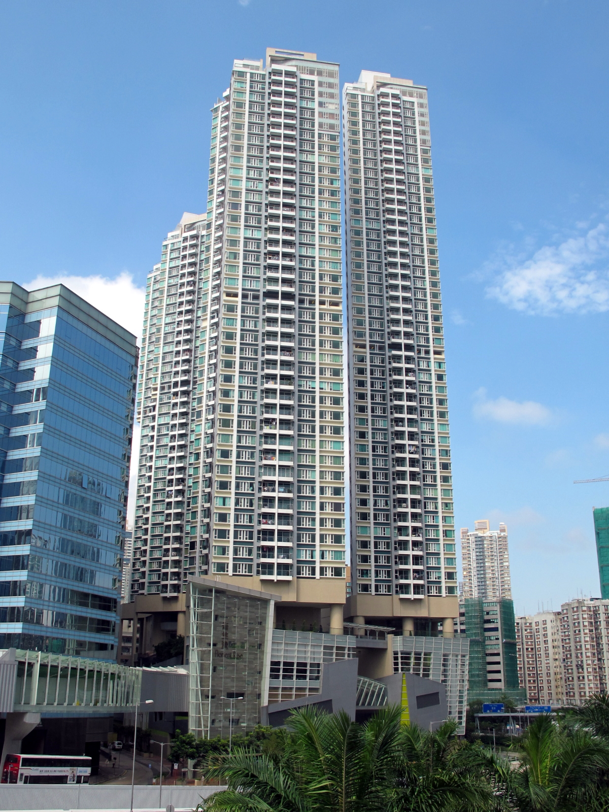 Florient Rise 海桃灣